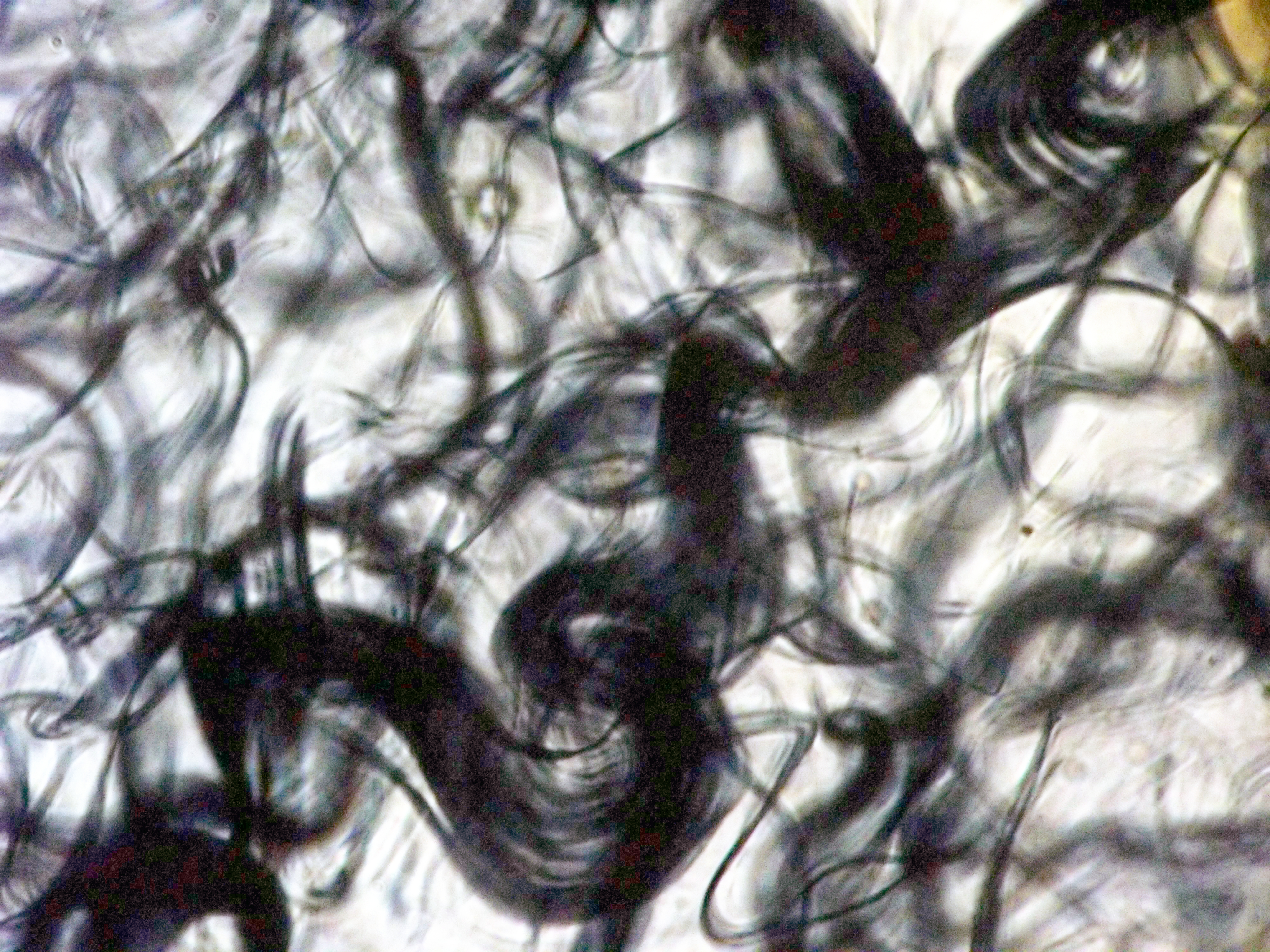 Fotografía de un preparado de bola de edema al microscopio óptico. Pueden verse las fibras de colágeno. Tinción argéntica; 400X.